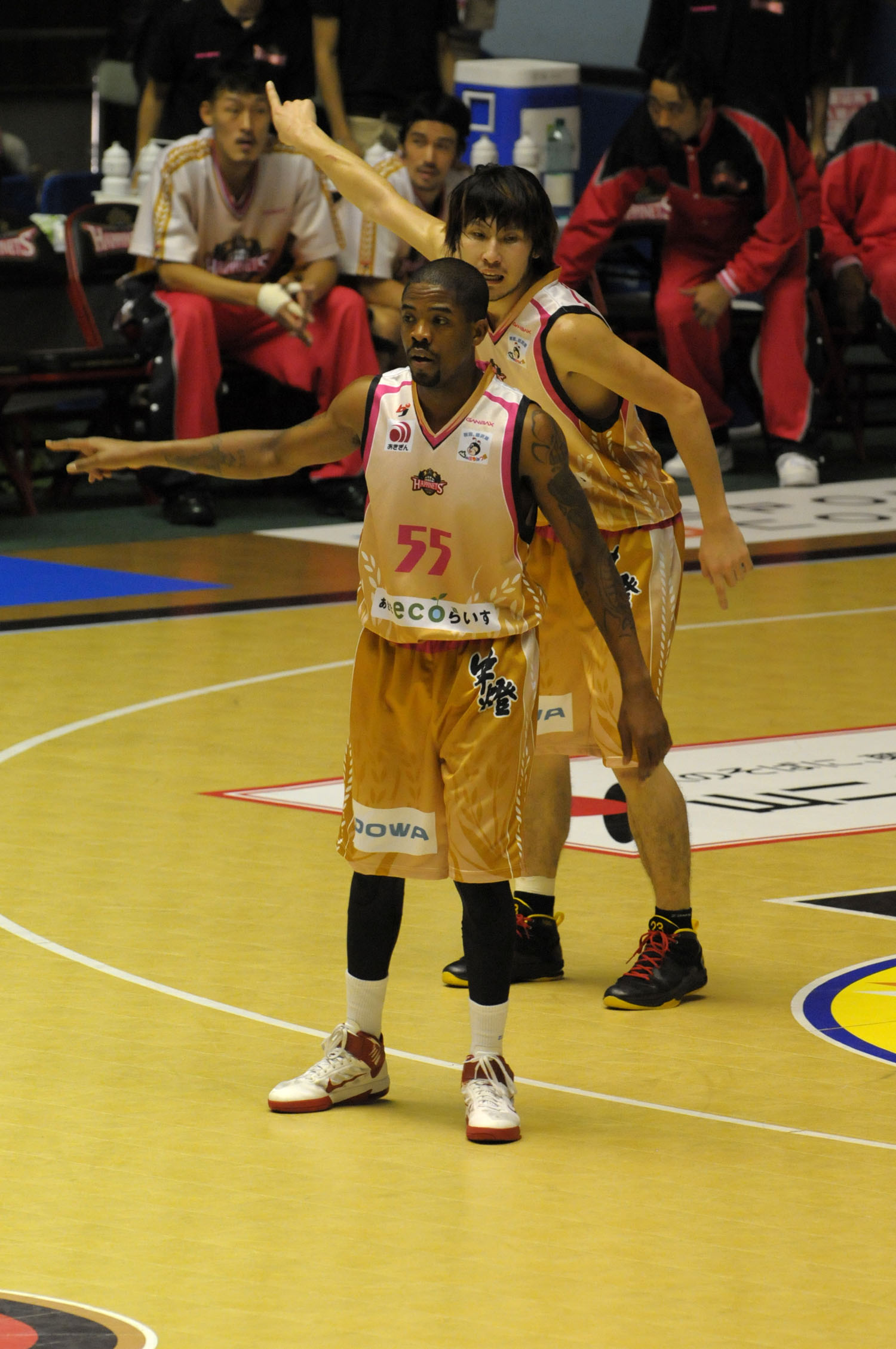 秋田ノーザンハピネッツ、マイケル・ガーデナー選手。秋田県立体育館で。